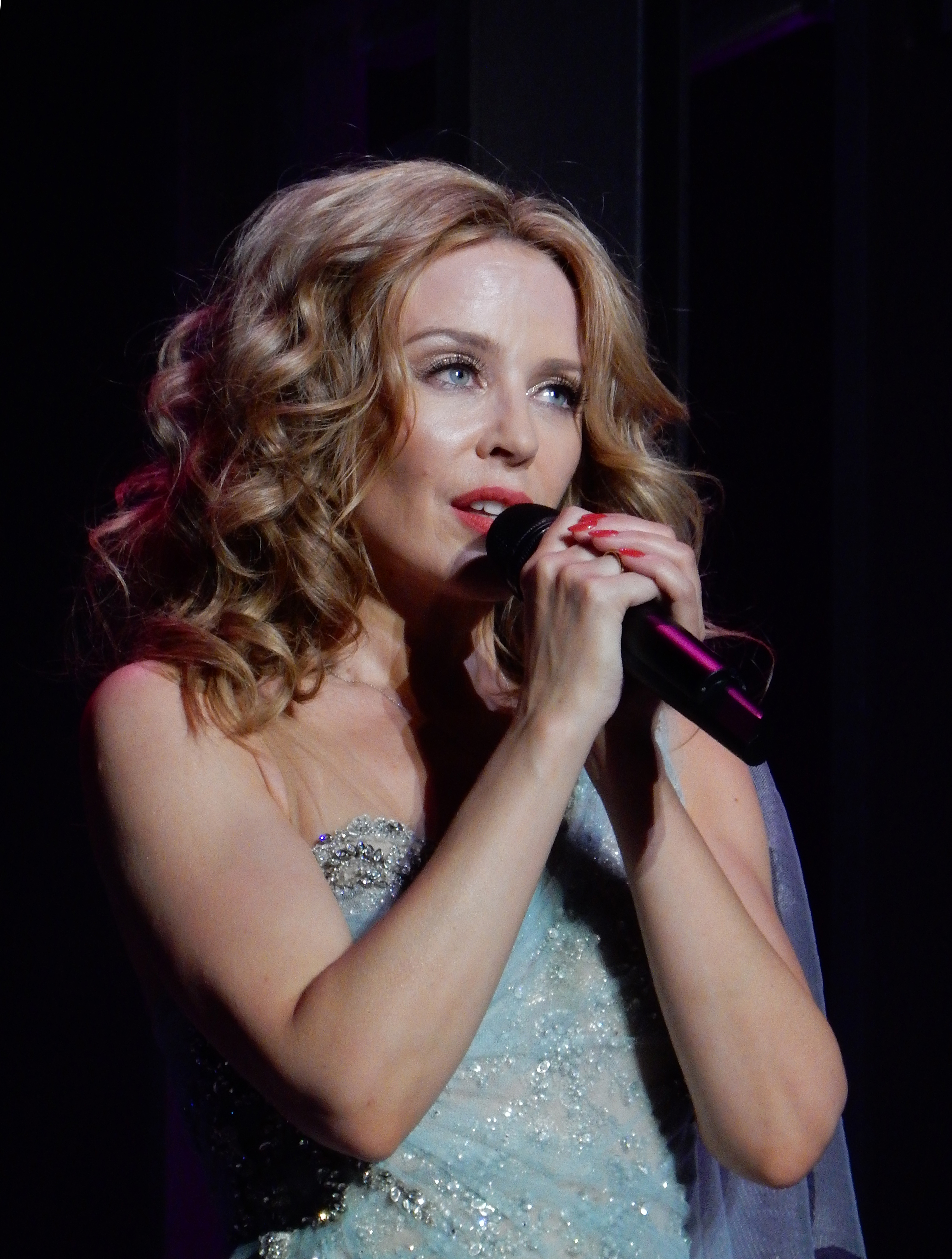 Kylie Minogue - Kiss Me Once Tour - Manchester - 26.09.14. - 154